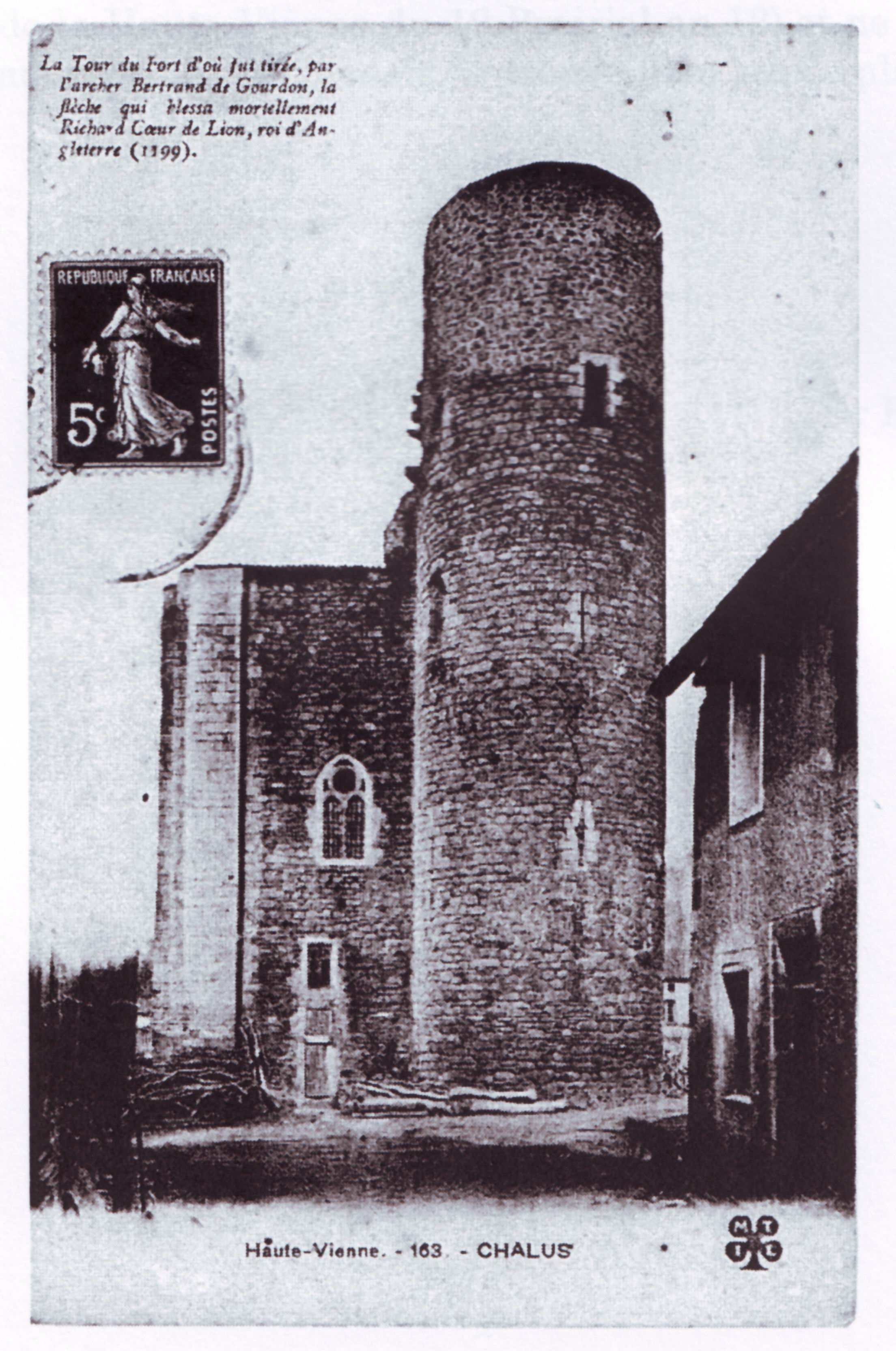 Tour de Maulmont présentée comme le lieu où Richard Coeur de Lion fut mortellement blessé en 1199